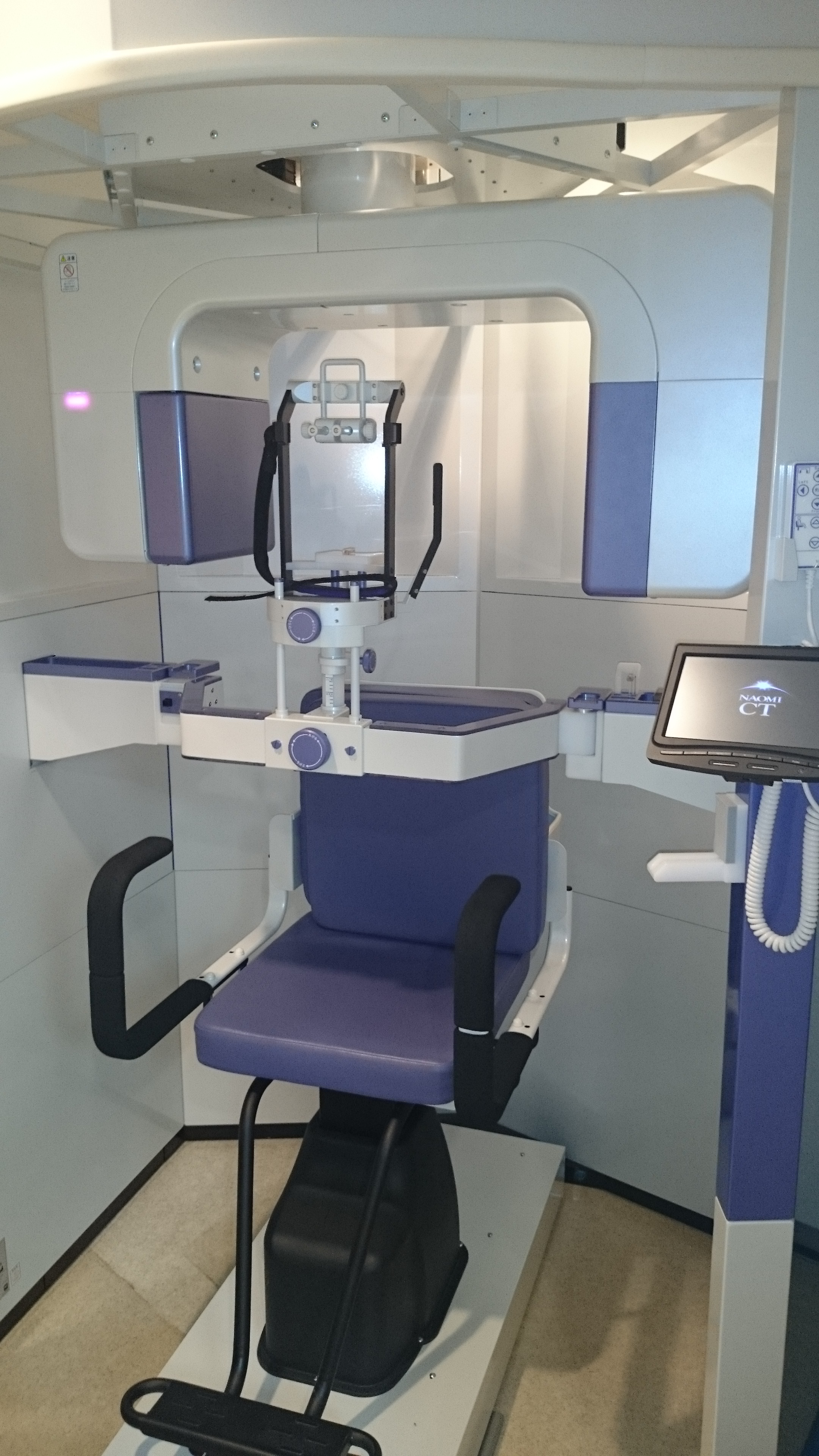 アーム型X線CT診断装置（NAOMI-CT）。